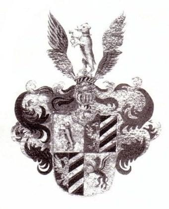 Wappen derer von Bärenfels (Baerenfels-Warnow), gemäß Erhebung in den Reichsadelsstand als “Baerenfels von Warnow” zu Wien 1709